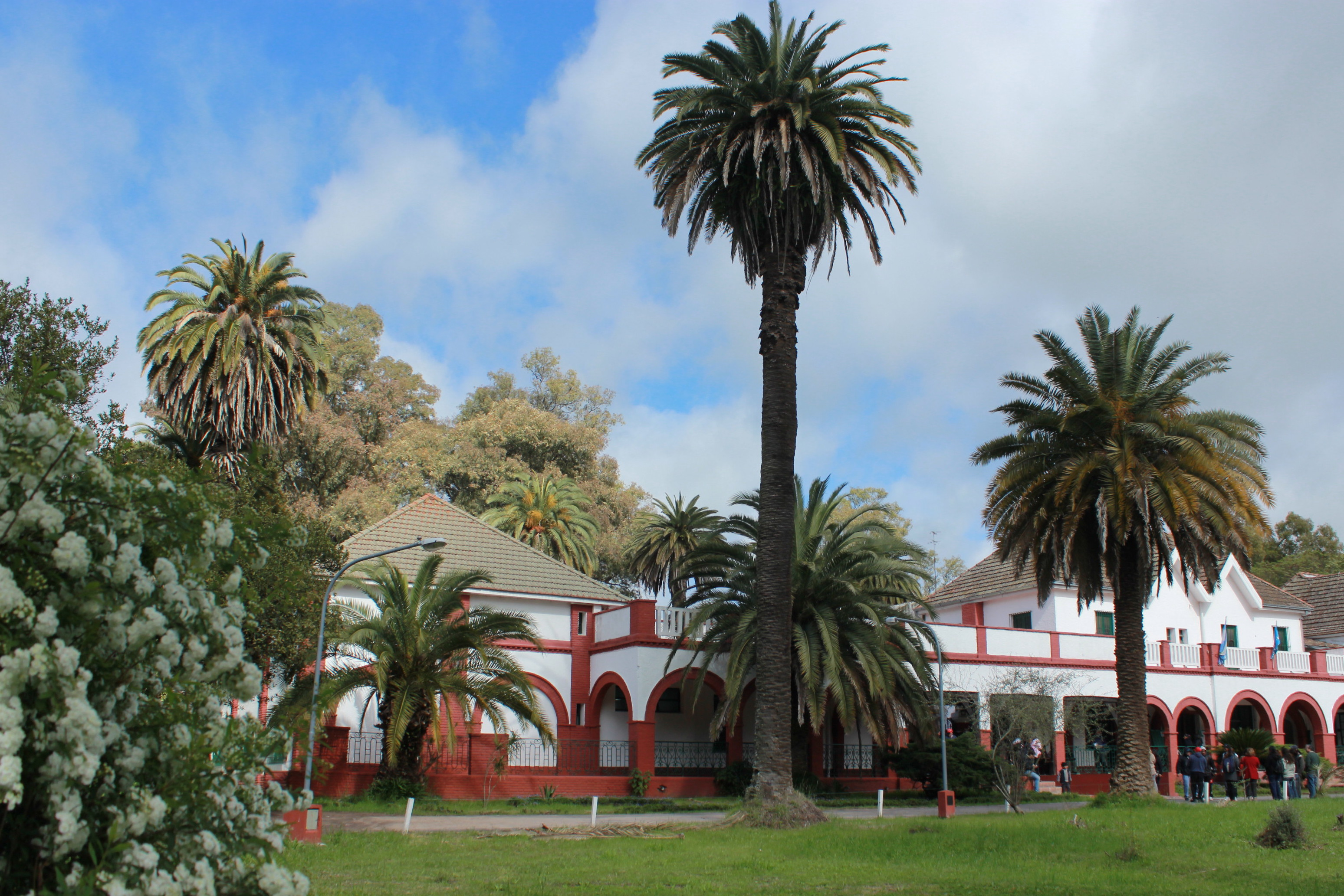 Casco de la Estancia Villanueva